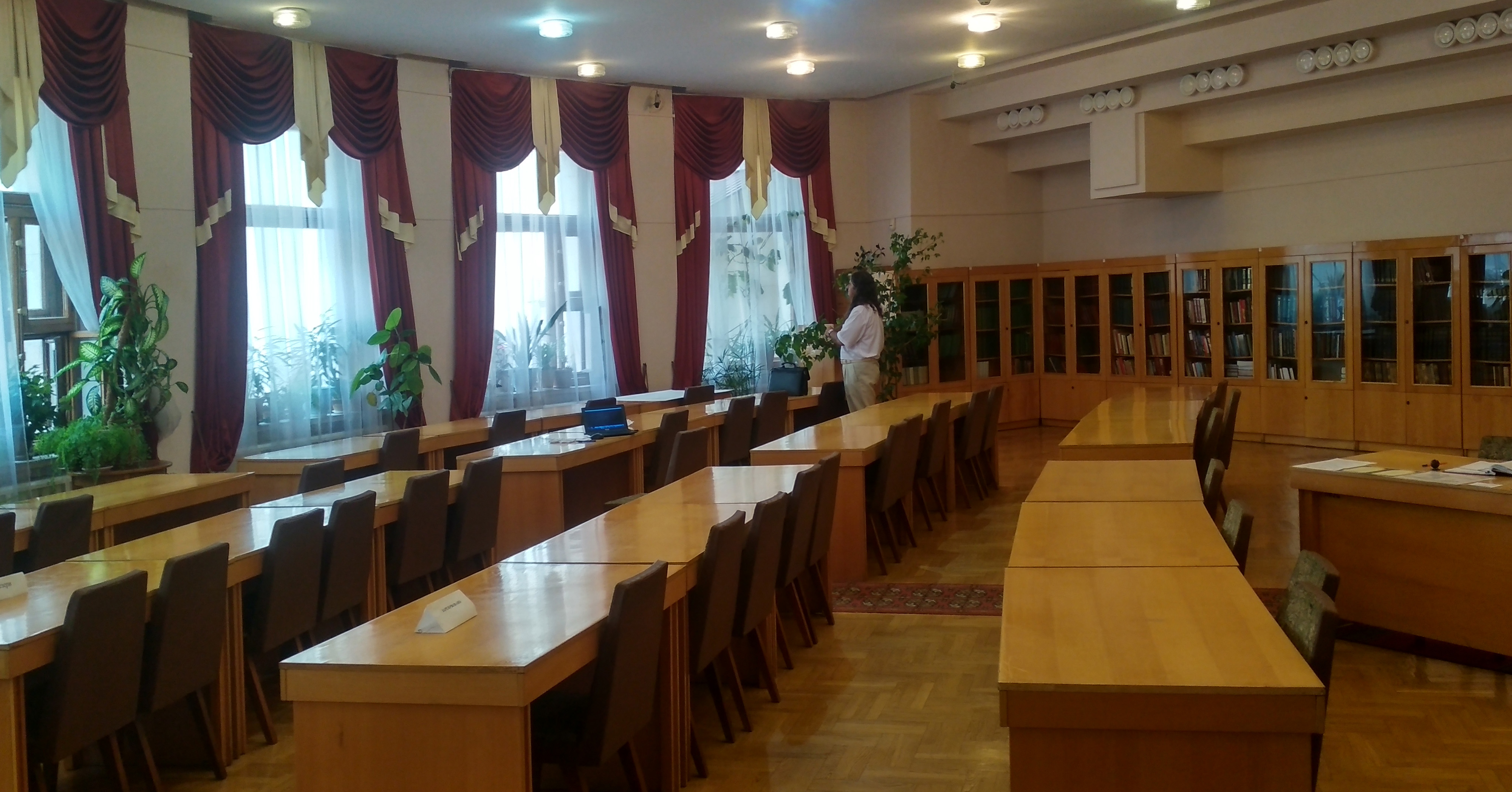 Читальный зал Центрального государственного архива общественных объединений Украины, г. Киев, улица Генерала Алмазова, 8.